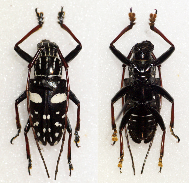 Aurivillius,1920 Sex: Male Data: 05-2013 - Surigao del sur - Mindanao - Philippines Size: ?